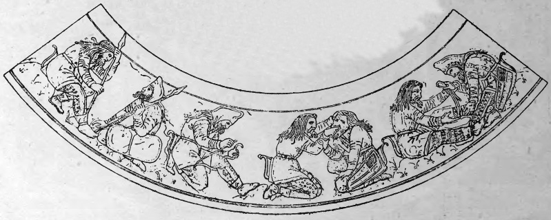 Степовики (Скити) на вазї з Кульобської могили (в Криму коло Керчи).